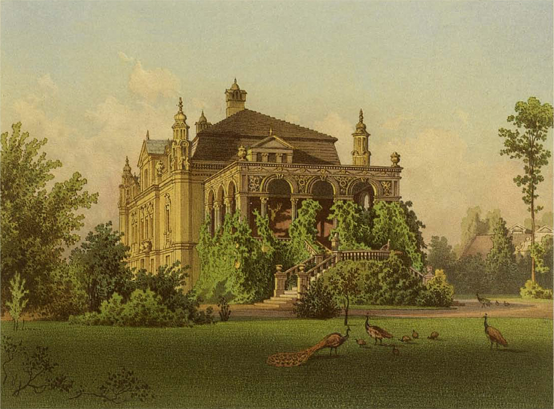 Majorat Bärsdorf, Kreis Goldberg-Haynau, Provinz Schlesien